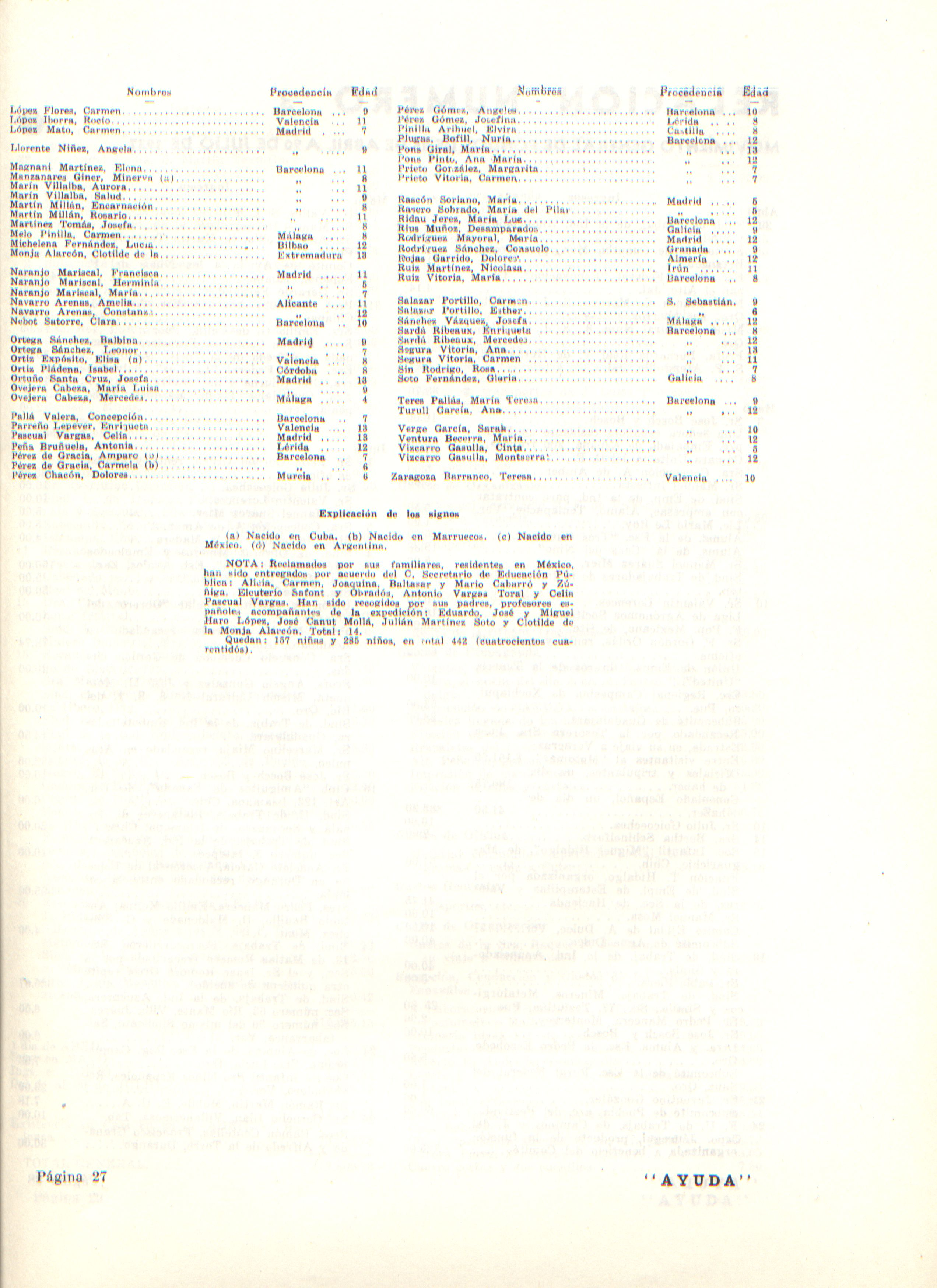 Relación de los niños españoles de Morelia, 7 de Junio de 1937 "Comité de Ayuda a los Niños del Pueblo Español" 3/3.